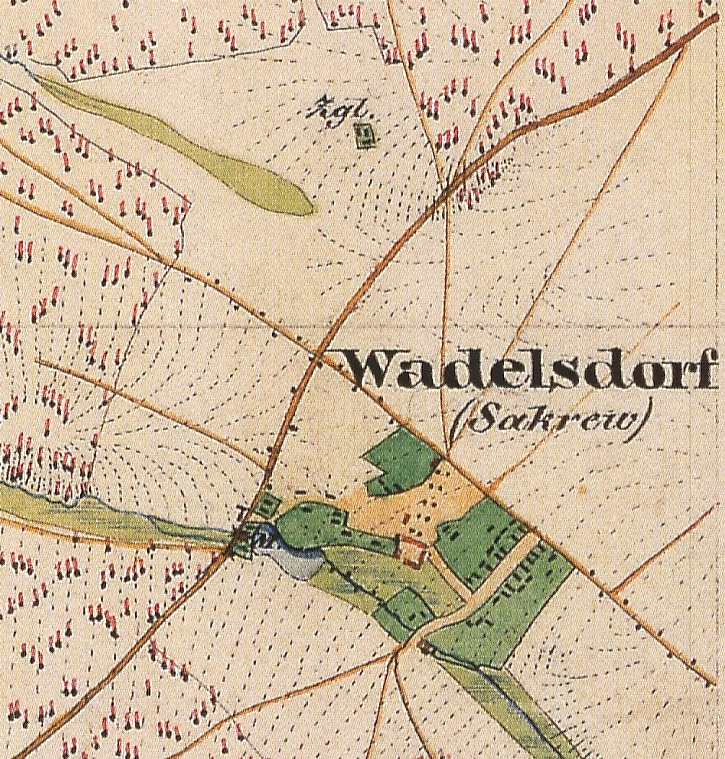 Wadelsdorf, Ortsteil der Stadt Spremberg, Landkreis Spree-Neiße, Brandenburg, Ausschnitt aus dem Urmesstischblatt 4352 Sellessen von 1845